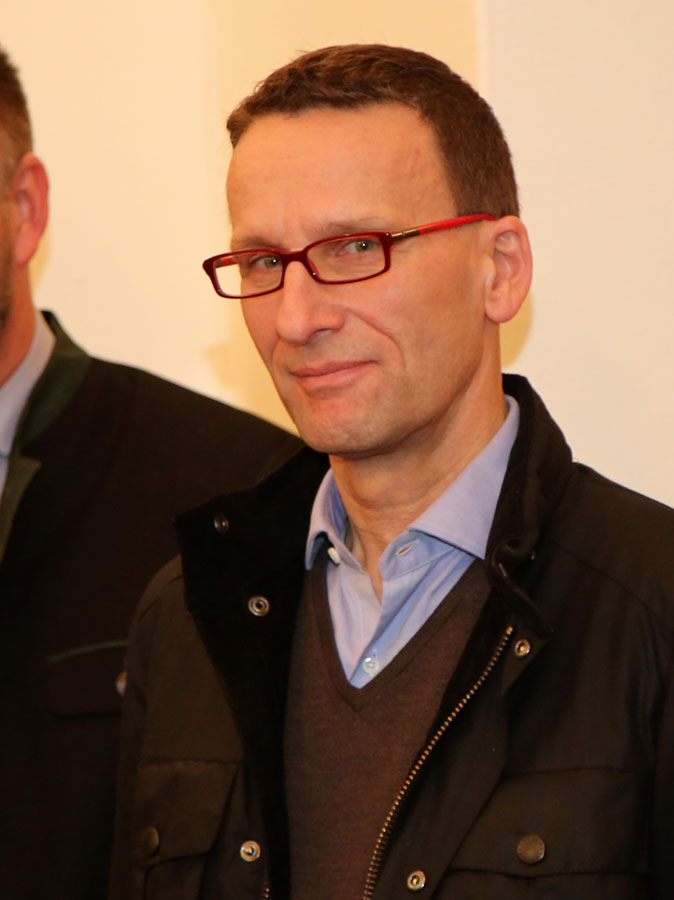 Leiter des Hans-Gabor-Belvedere-Gesangswettbewerbs